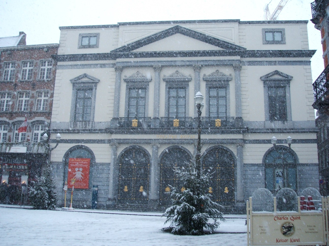 Fabrice Duplaquet : Lbre de droit